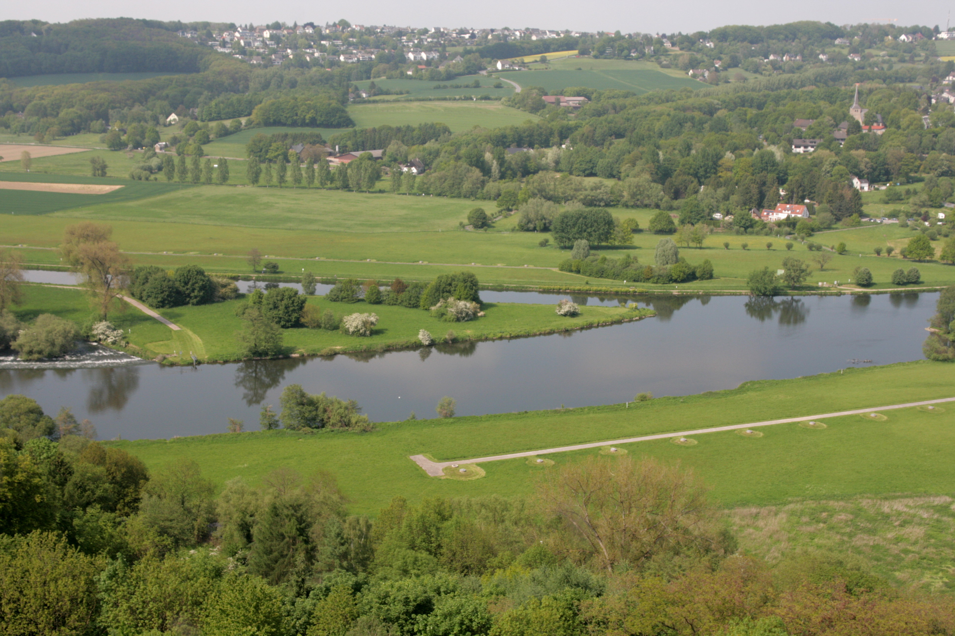 Blick von der Burg Blankenstein in Hattingen-Blankenstein